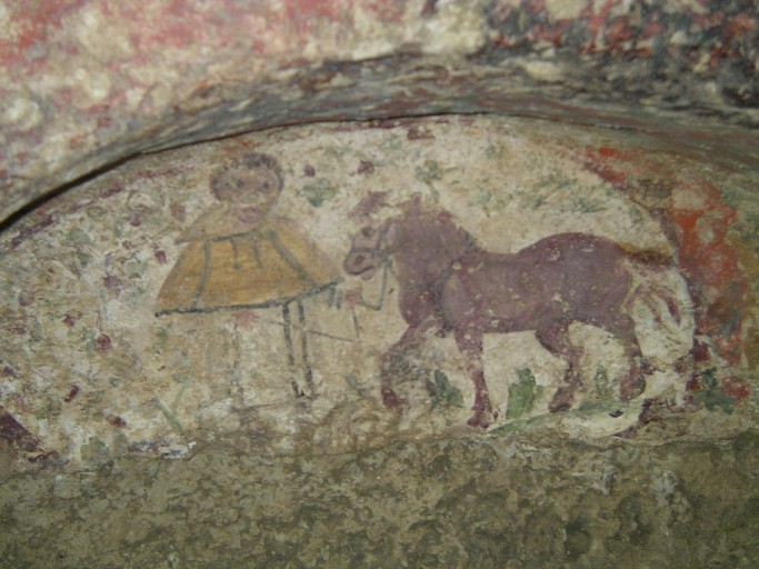 frühchristliche Katakombe von Villagrazia di Carini, Sizilien